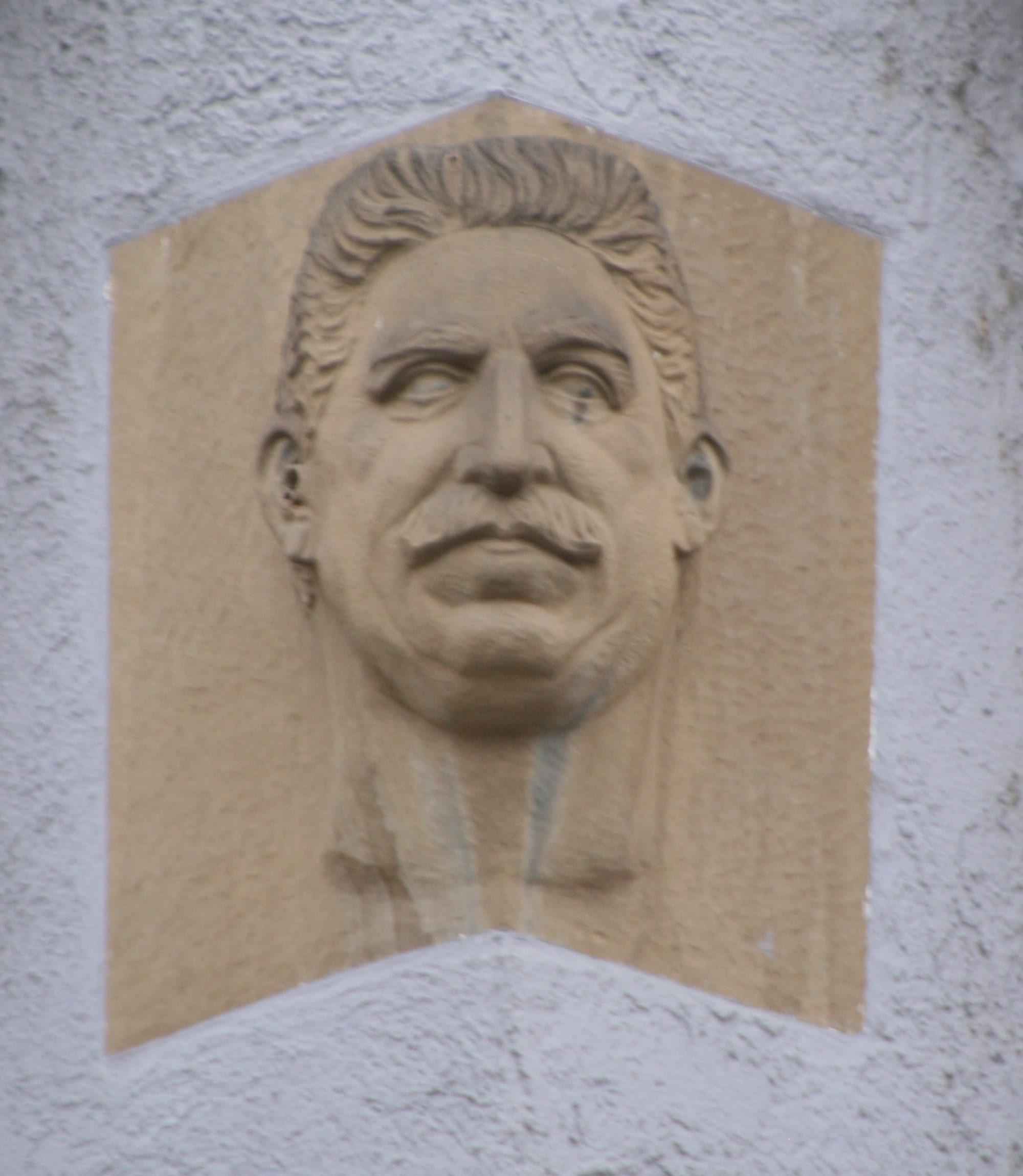 Porträtkopf des Heilbronner Stadtbaurats Georg Scherer (s. [1]) am Alten Milchhof in Heilbronn